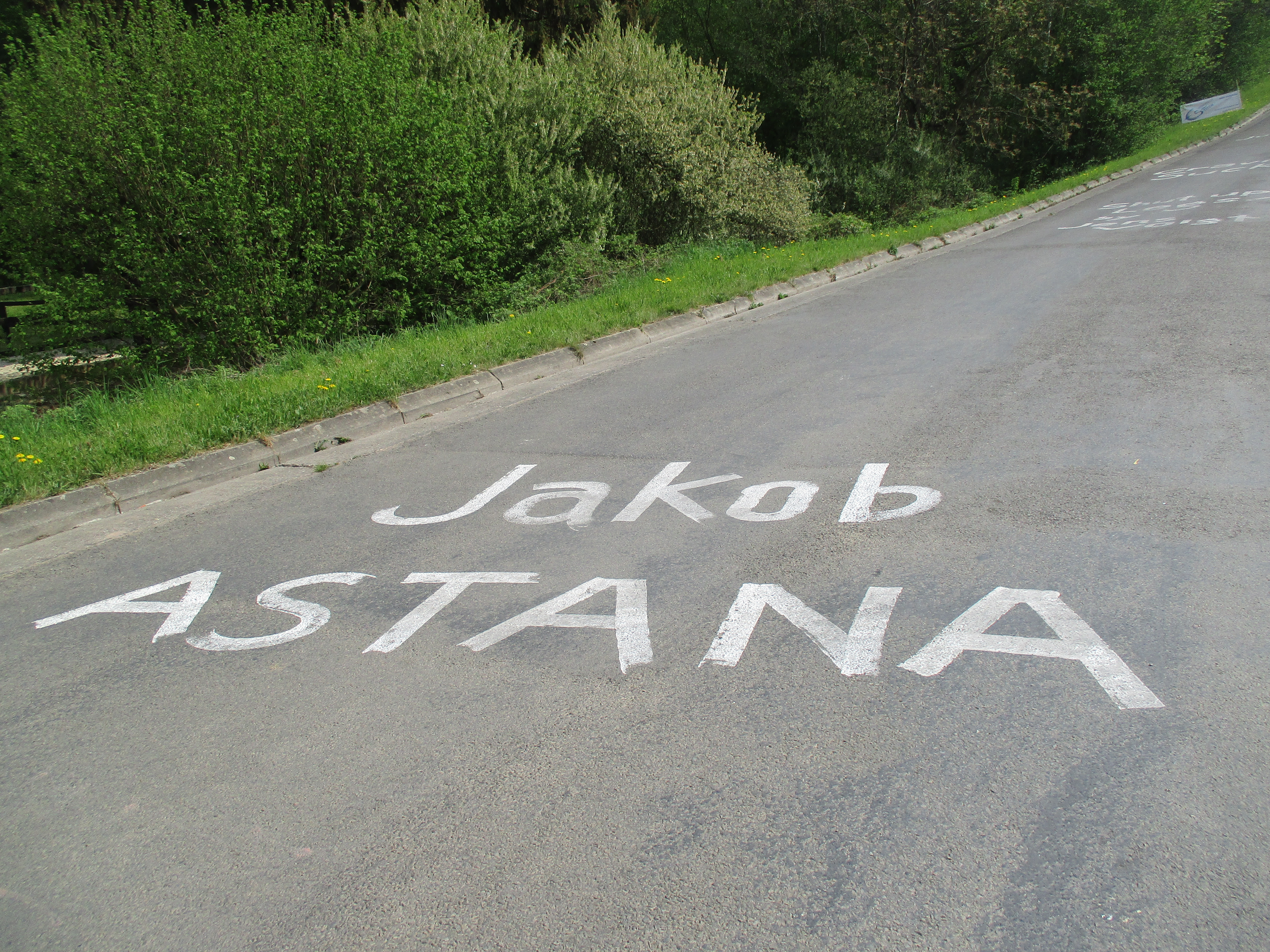 Côte de la Redoute, Liège-Bastogne-Liège 2018.